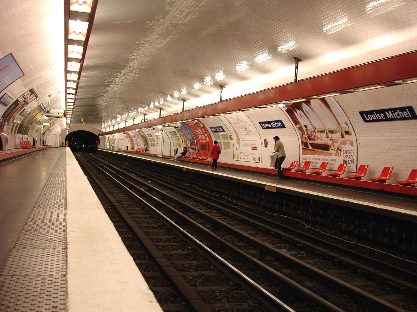 La station Louise Michel de la ligne 3 du métro de Paris, France